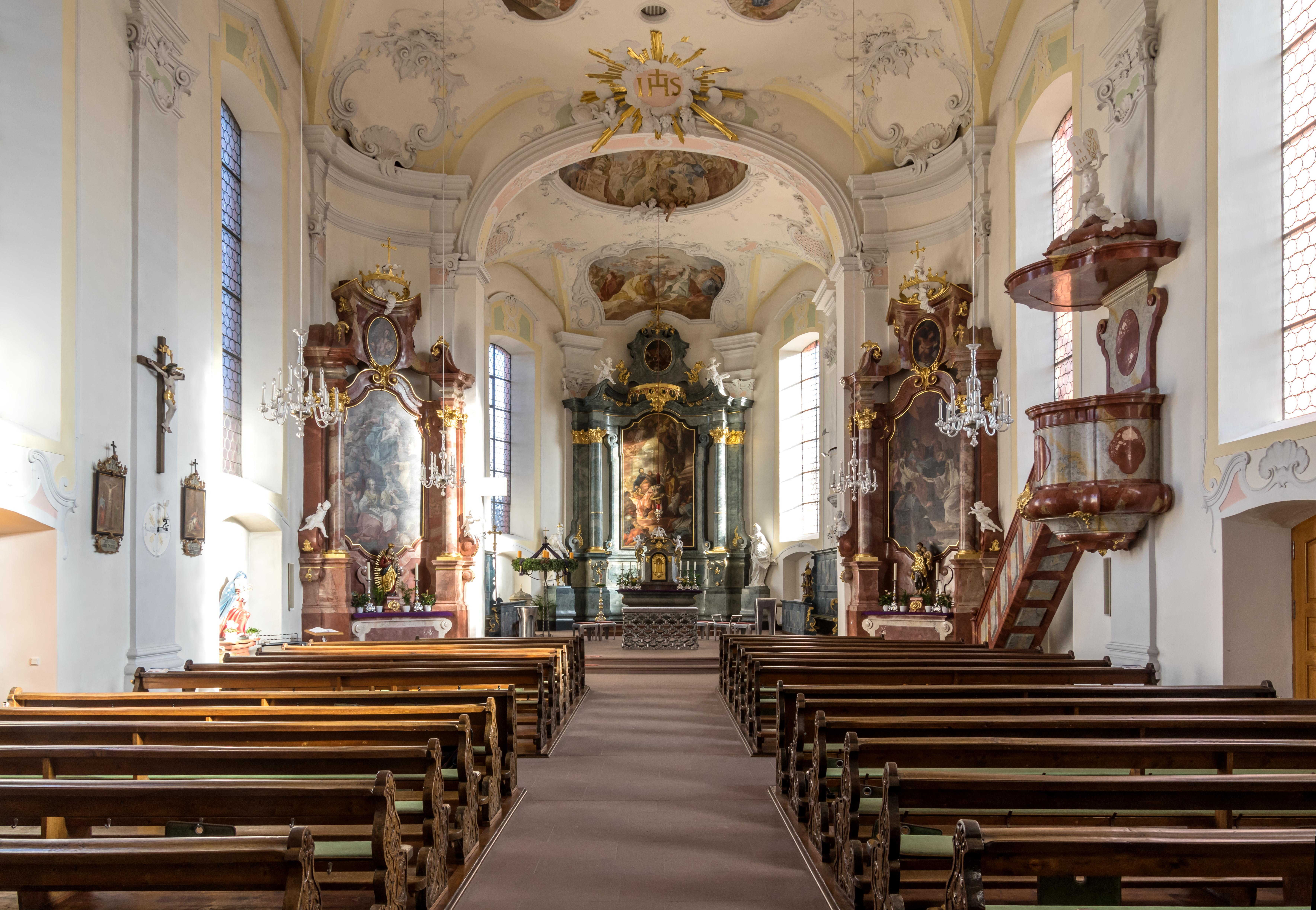 Bilder aus der katholischen Kirche St. Remigius in Merdingen St. Remigius